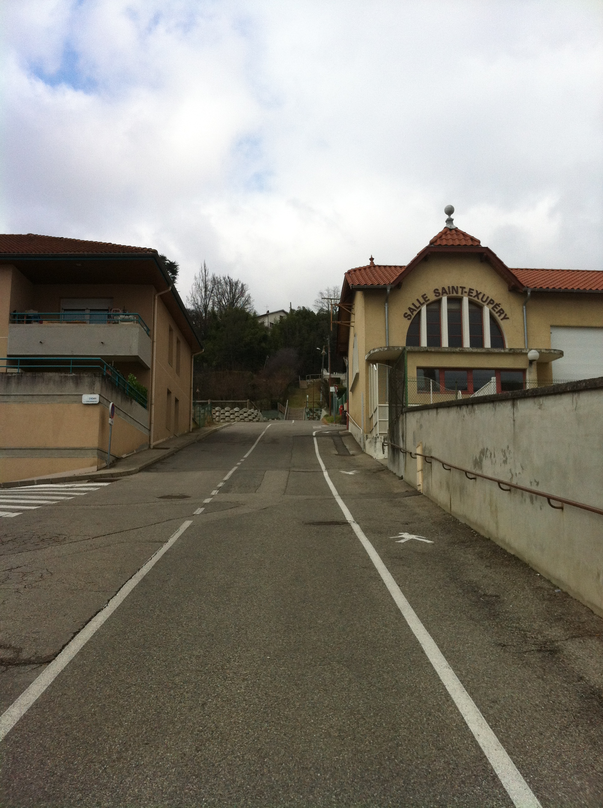 Salle municipale Saint-Exupéry (Neyron).